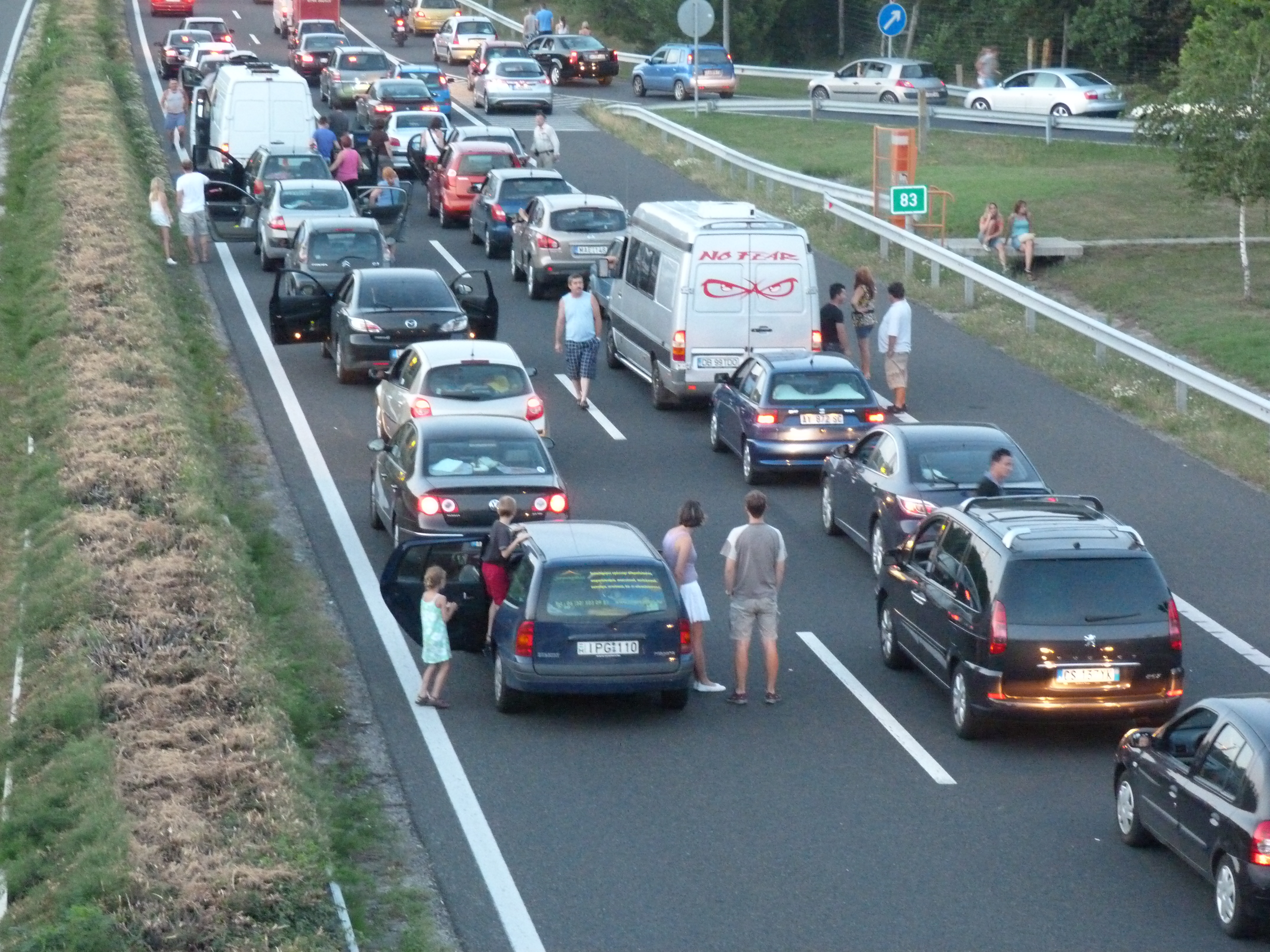 A felvétel 2012. junius 24 -én készült az M7 -es autópályán, a 83 km-nél levő AGIP benzinkútnál. A forgalmat egy felborult kamion akadályozta. Megjelent Creative Commons alatt a Metapolisz DVD sorozatban.